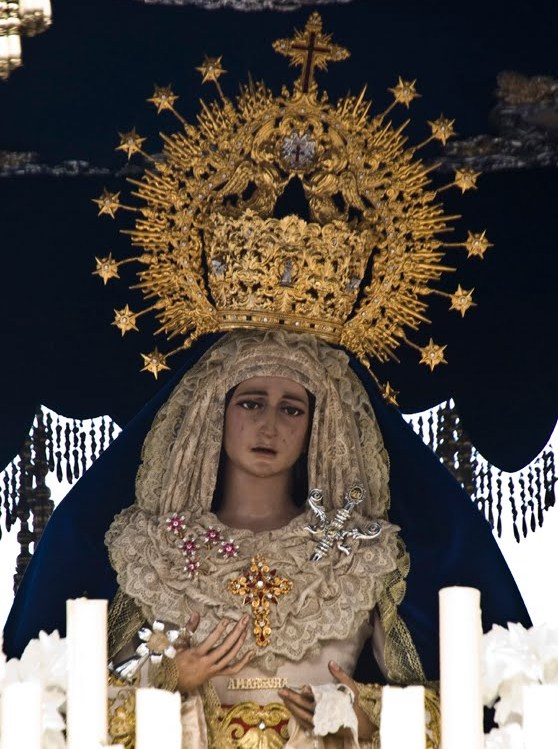 María Sta. de la Amargura